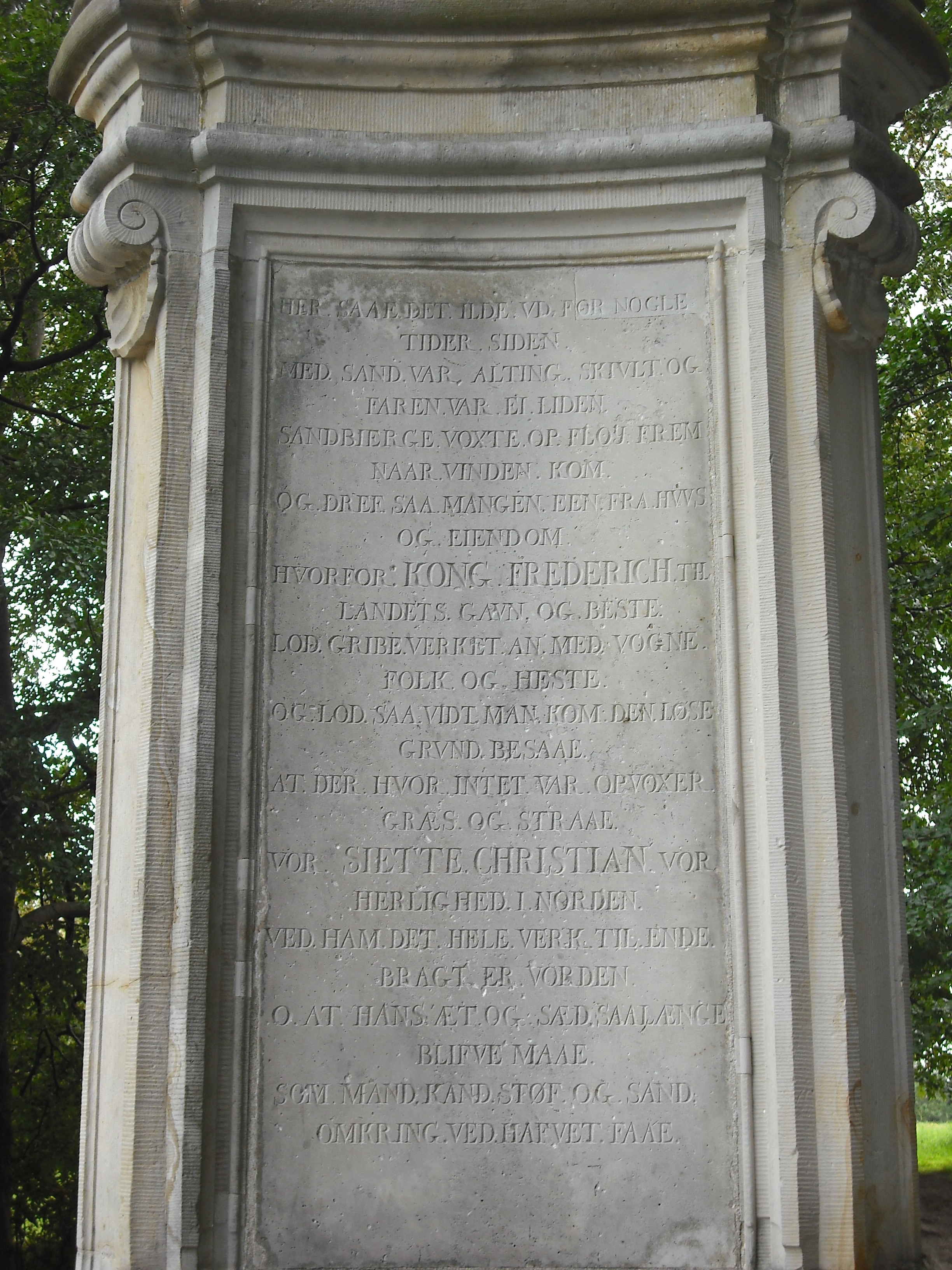 Den danske tekst på monumentet. På de to andre sider er der en latinsk og en tysk tekst.